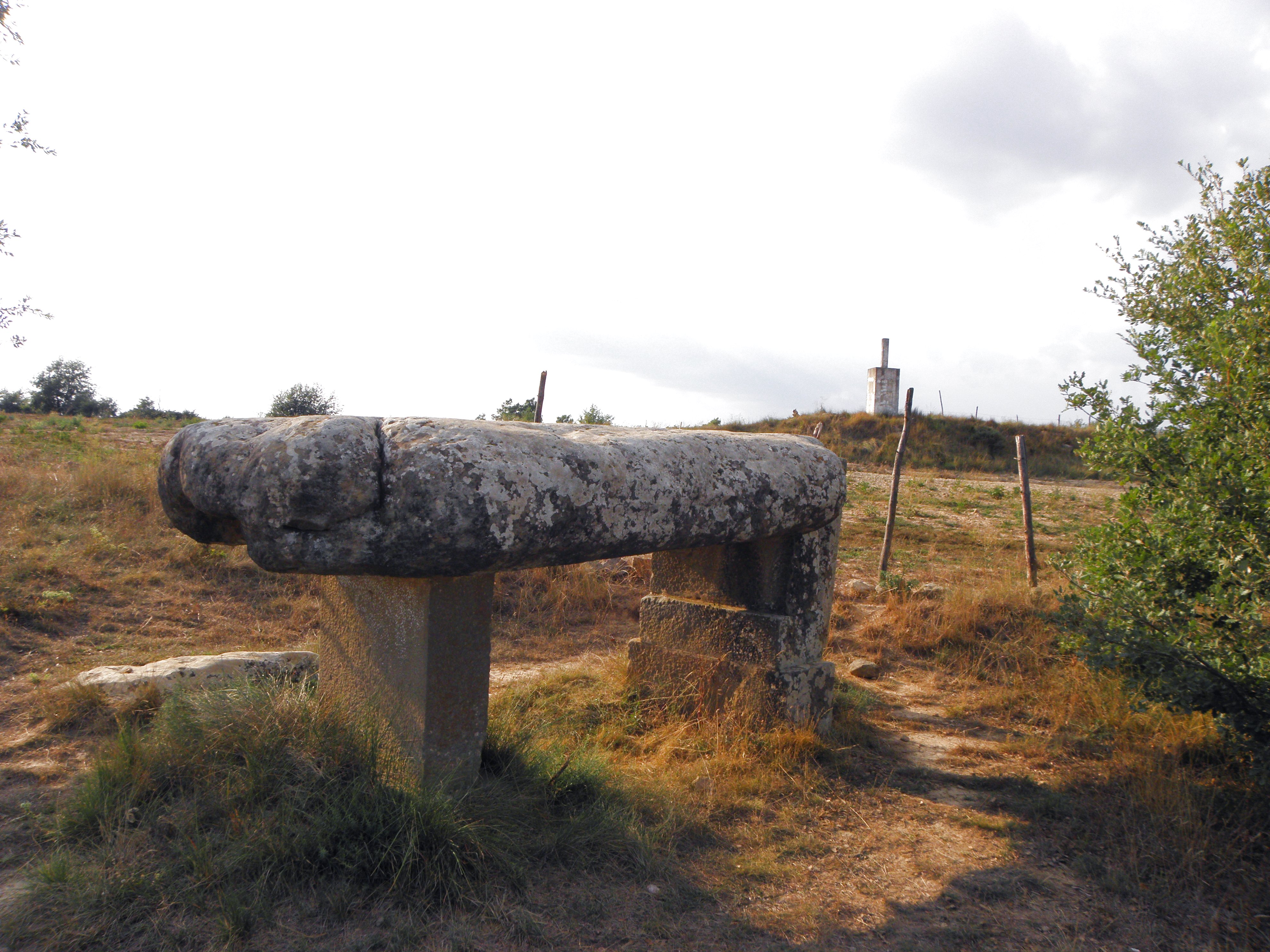 El roc de la Mare de Déu, a les rodalies del Santuari del Miracle (Riner, Solsonès) vist des del SE. Al fons, el vèrtex geodèsic del turó de Sant Gabriel.